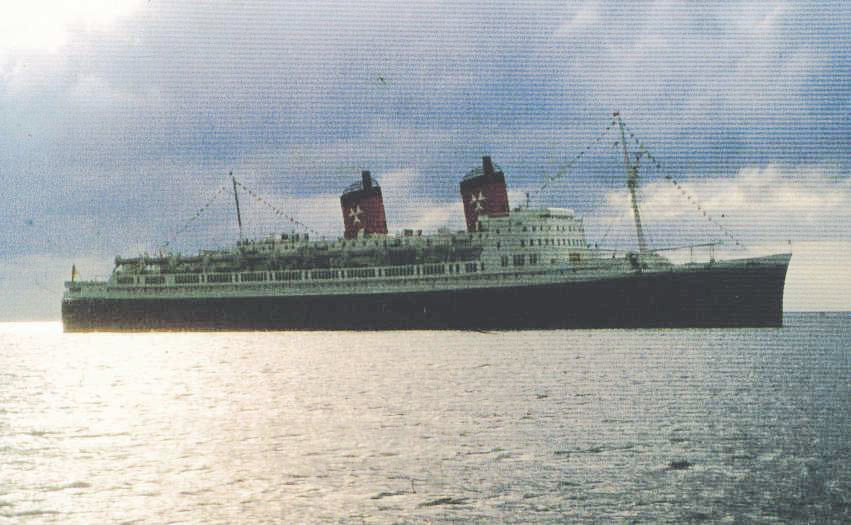 TS Hanseatic, eingescanntes Dia